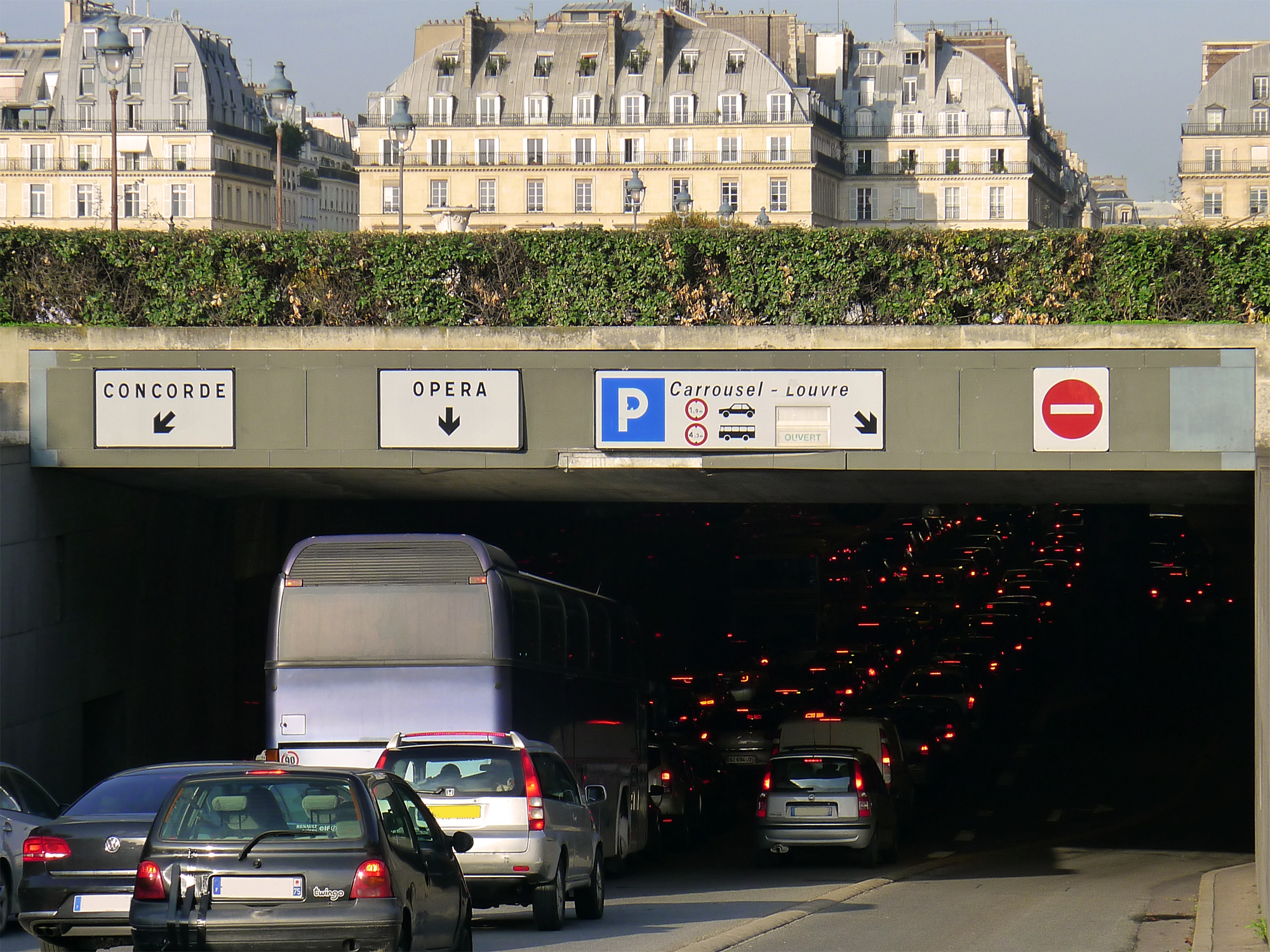 Avenue du Général-Lemmonier - Paris Ier